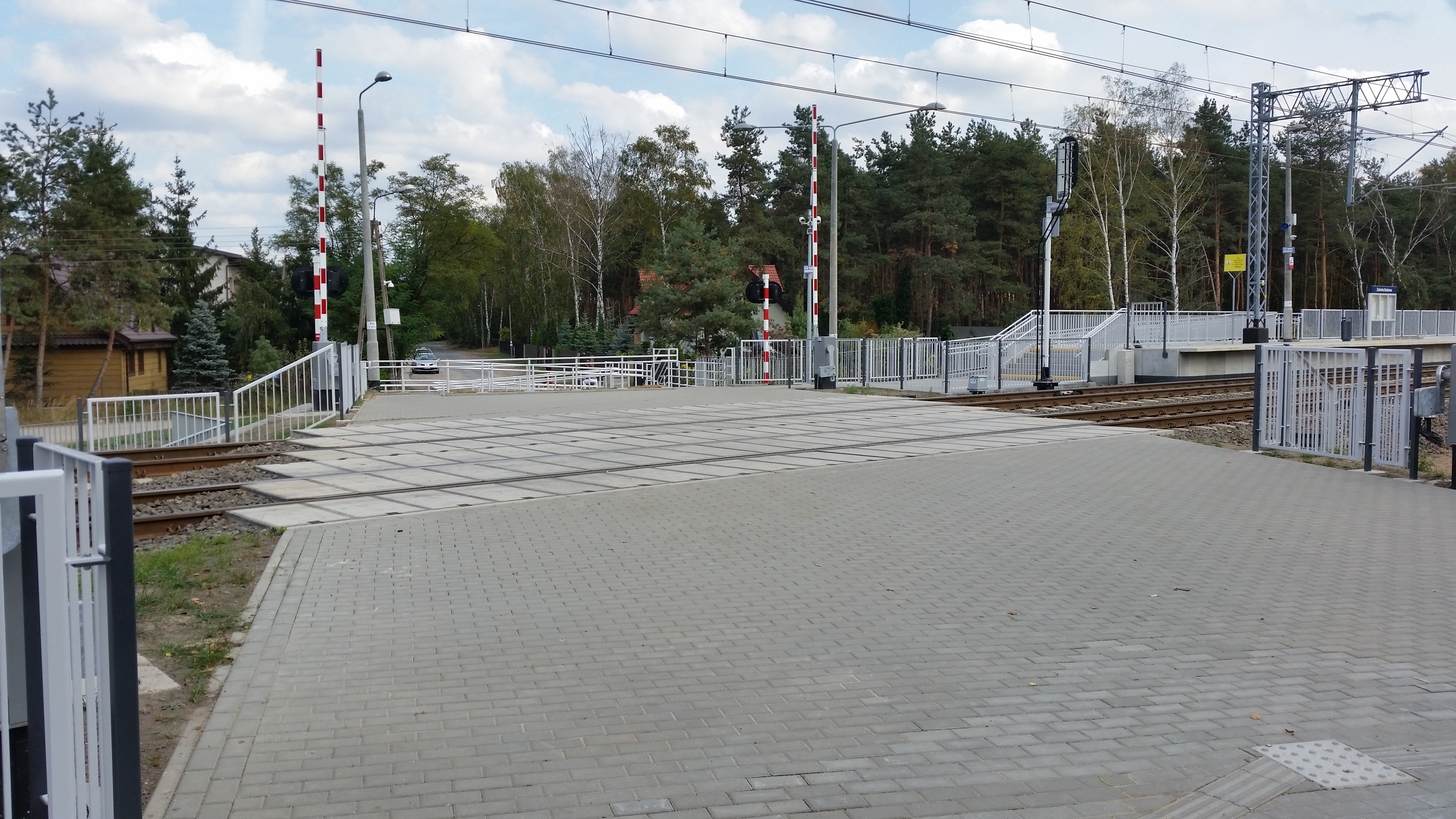 Nowy przejazd zbudowany jak samochodowy, lecz z dojazdem zablokowanymi barierami w Zielonce Bankowej